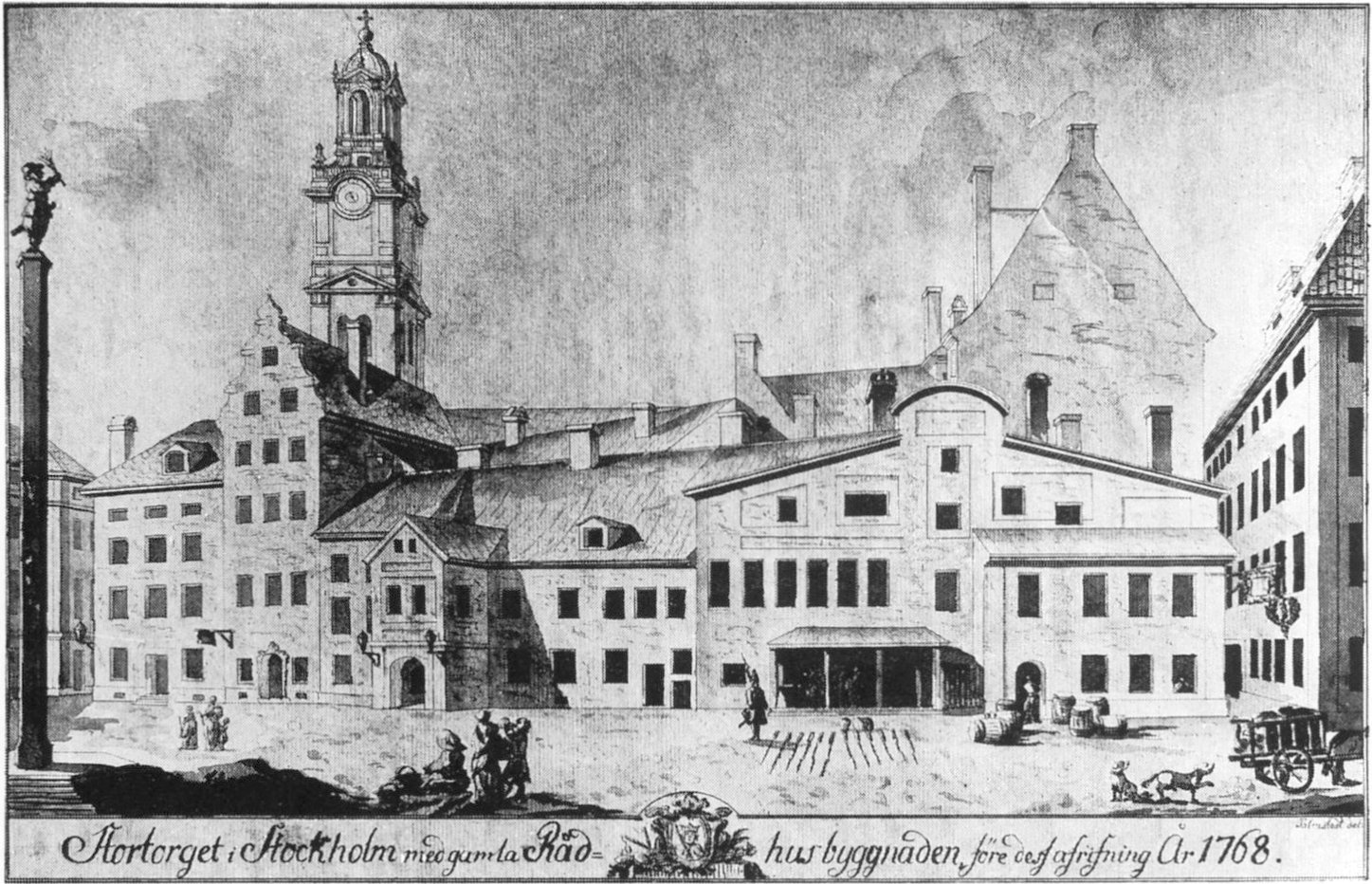 Stockholms före detta rådhus (rådstugan) vid Stortorget i Stockholm, laverad teckning av Erik Palmstedt